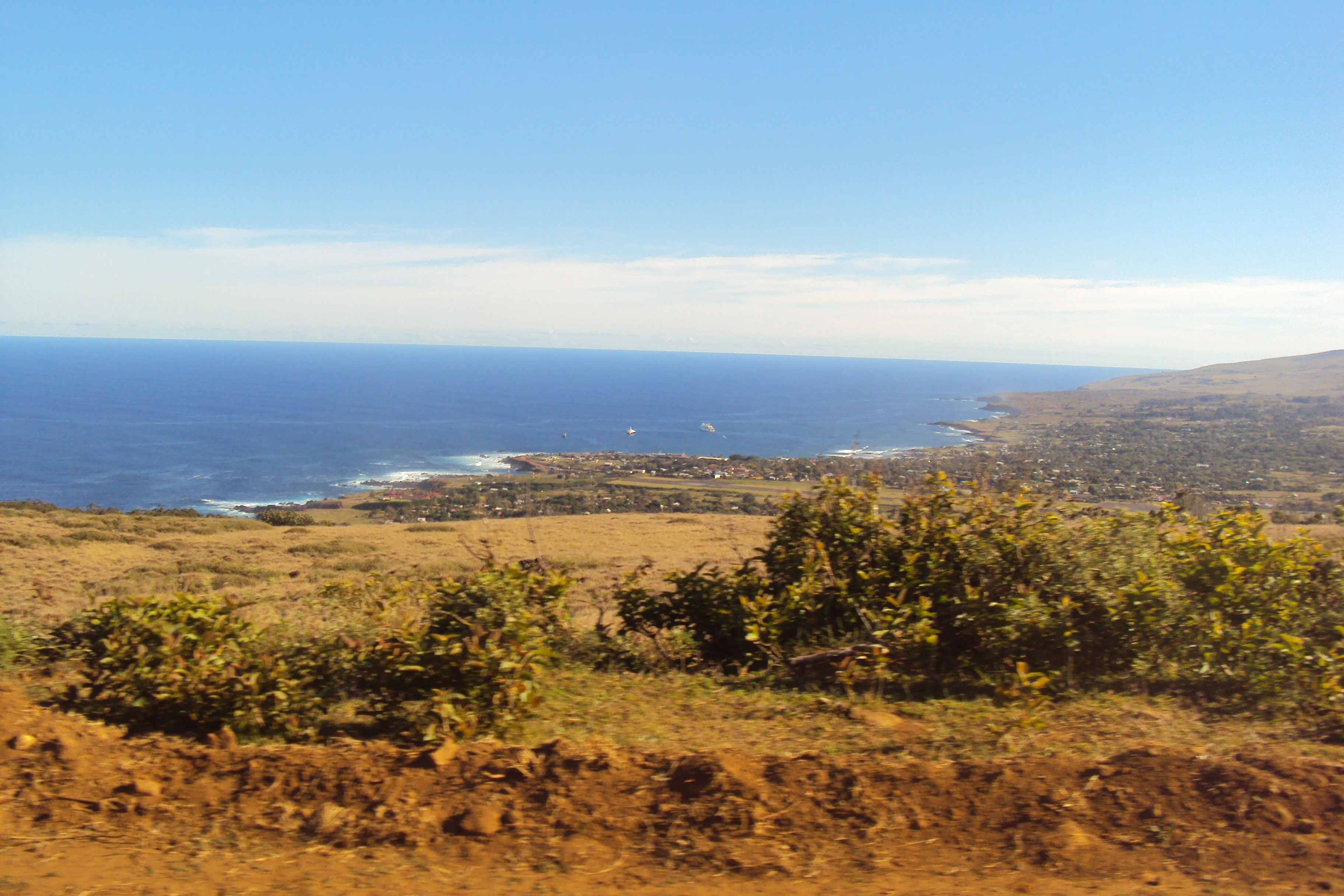 Vista de Hanga Roa, desde camino al volcán Rano Kao